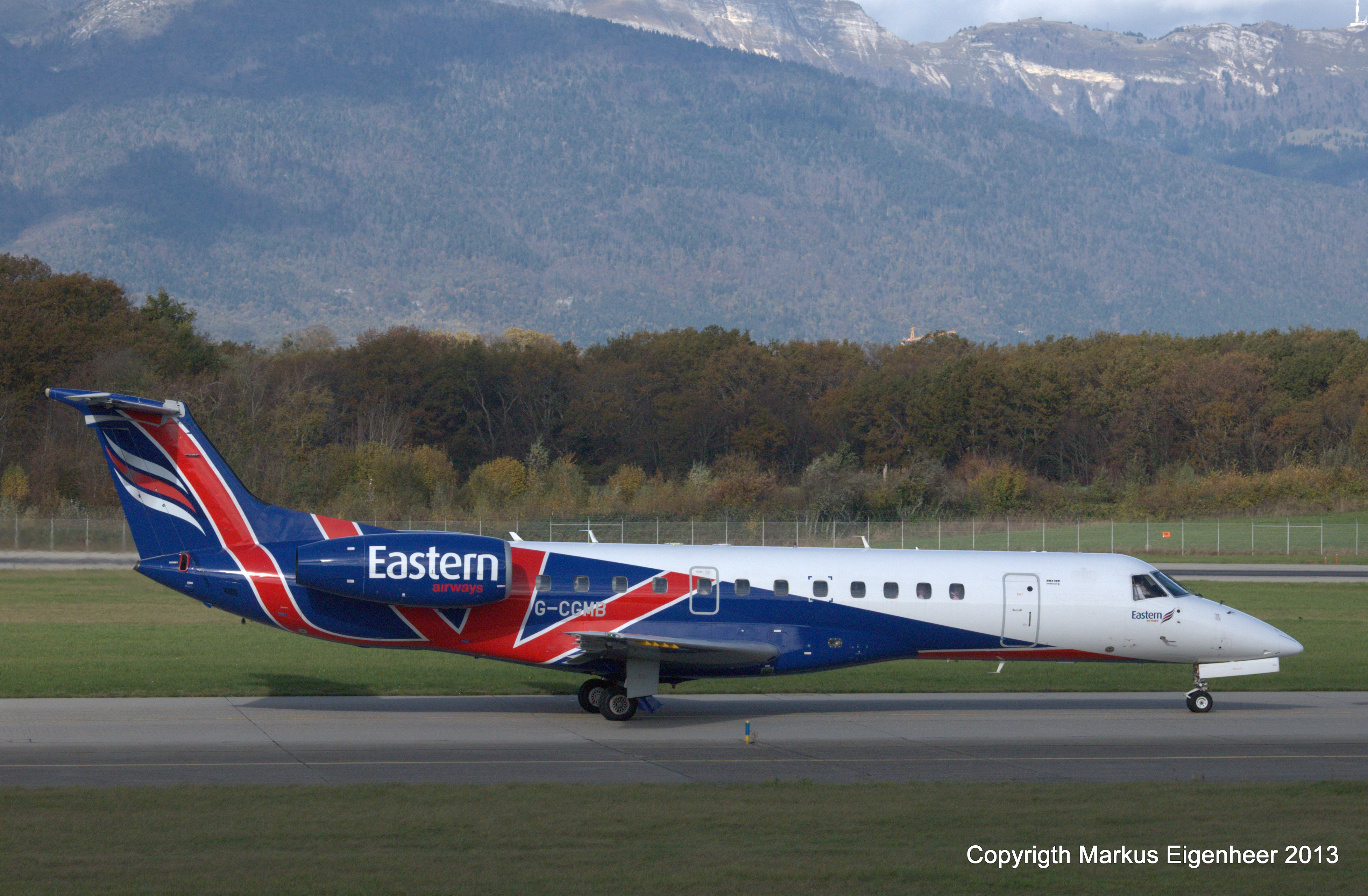 GVA 08.11.2013